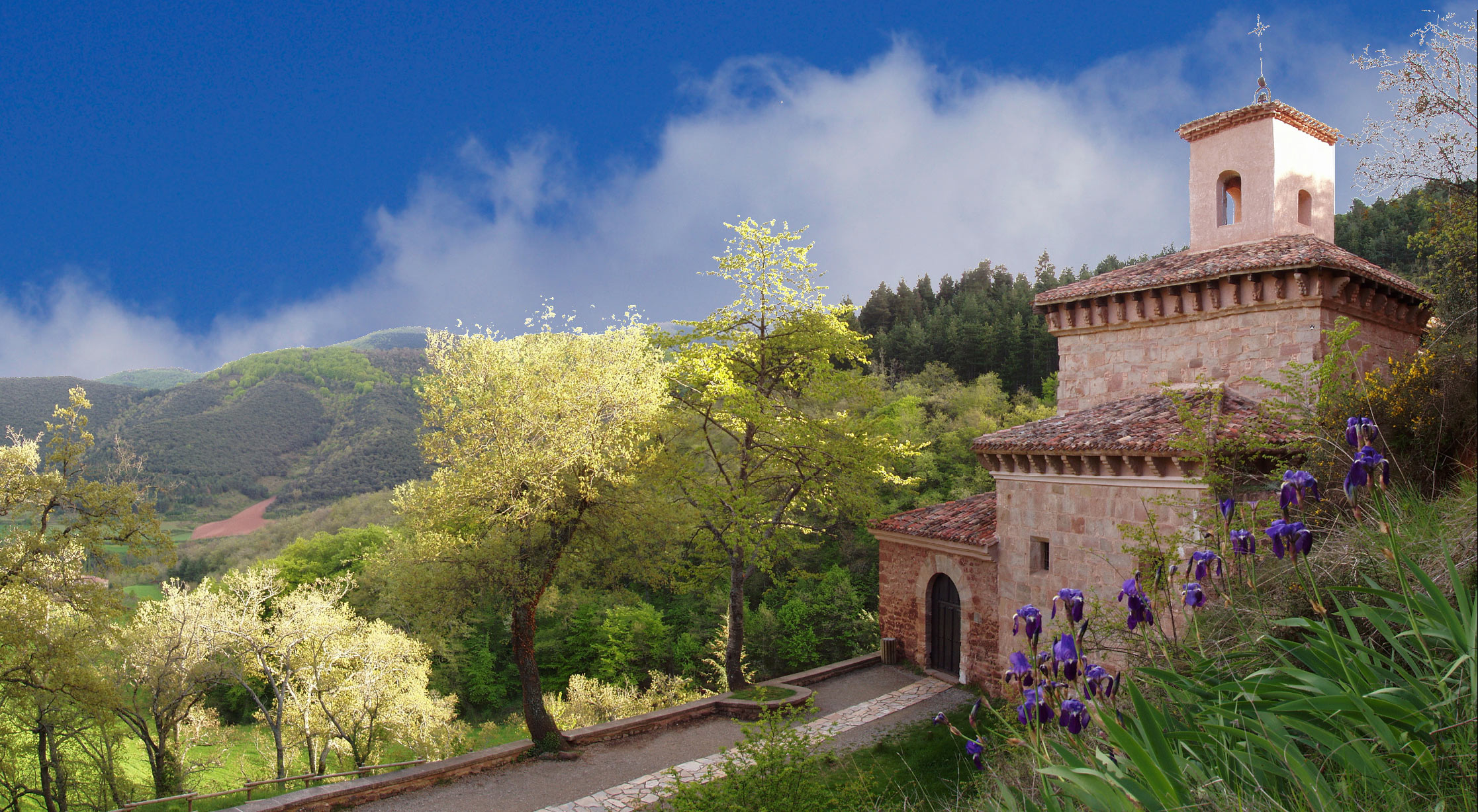 Monasterio de Suso. San Millán de la Cogolla, La Rioja. Patrimonio de la Humanidad